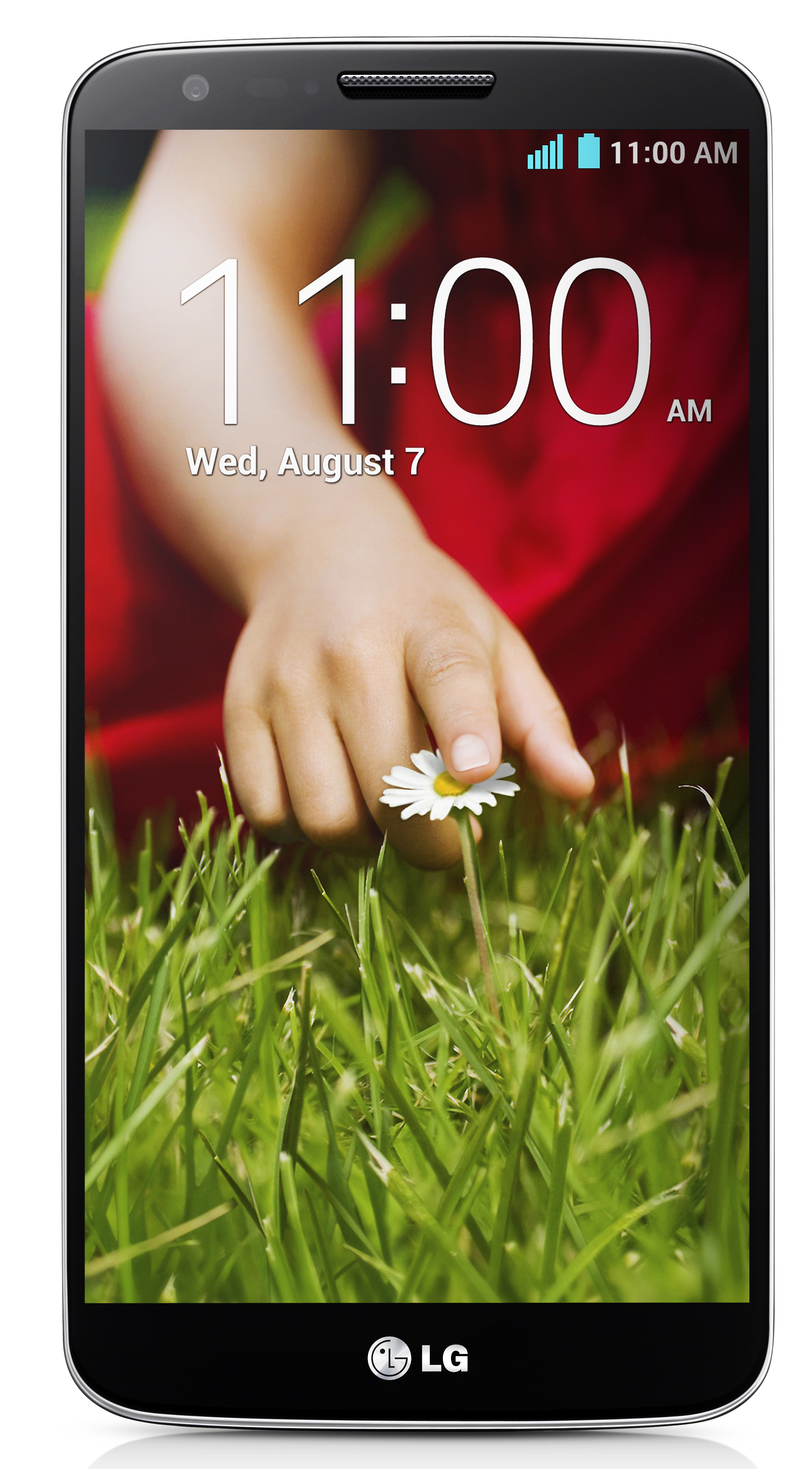 LG전자가 7일 서울 여의도 LG트윈타워에서 ‘LG G2 Day Seoul’ 행사를 갖고, 차기 전략 스마트폰 ‘LG G2’를 공개했다. LG전자는 8일 한국 출시를 시작으로 내달 북미와 유럽으로 확대하는 등 8주 이내에 세계 130여 통신사와 함께 글로벌 런칭을 완료할 예정이다. - LG G2 제품 사진 ※ LG전자 뉴스룸 에서 관련 보도자료를 확인하실 수 있습니다.